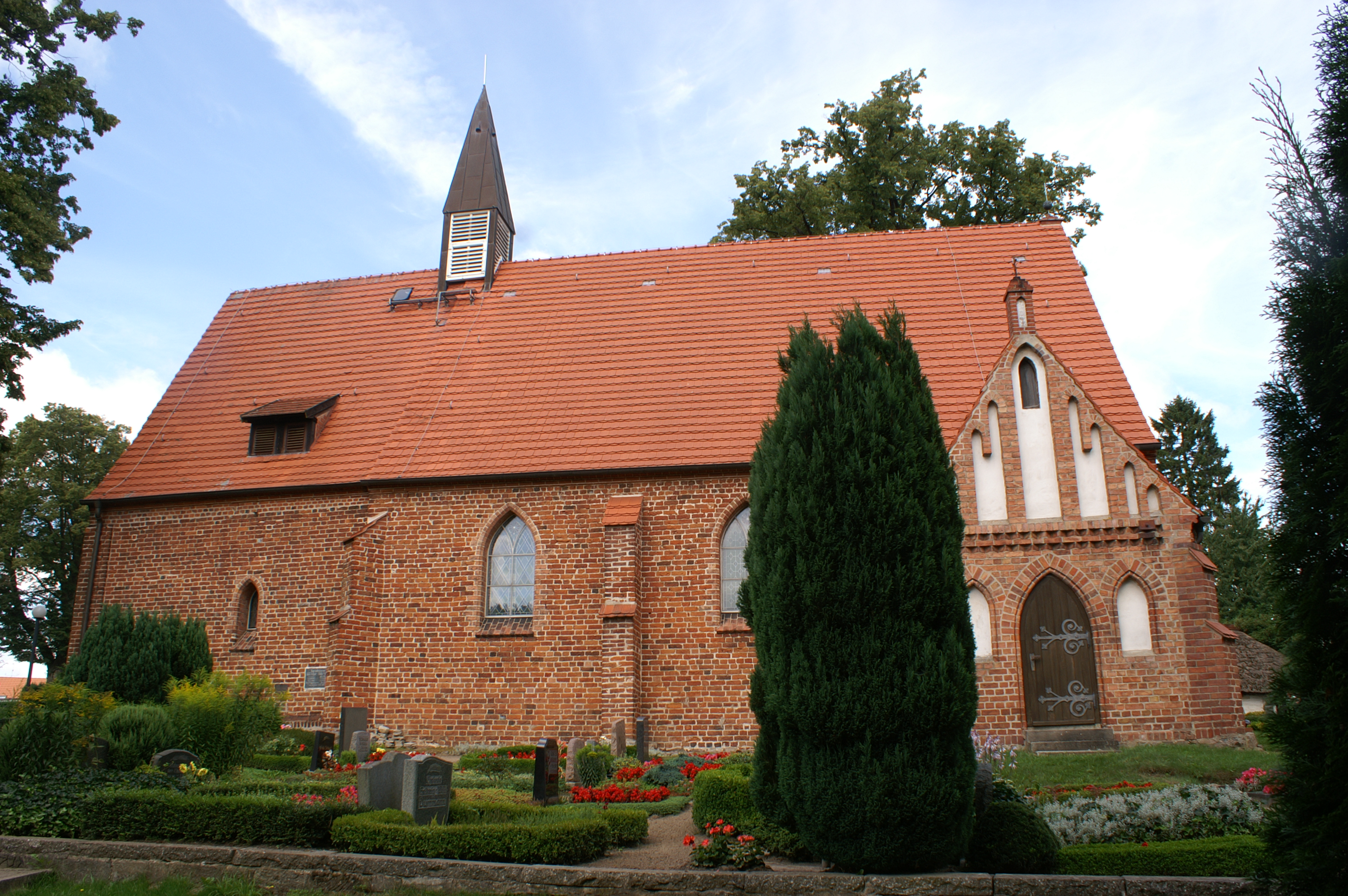 St.-Johannis-Kirche Katzow, Landkreis Ostvorpommern